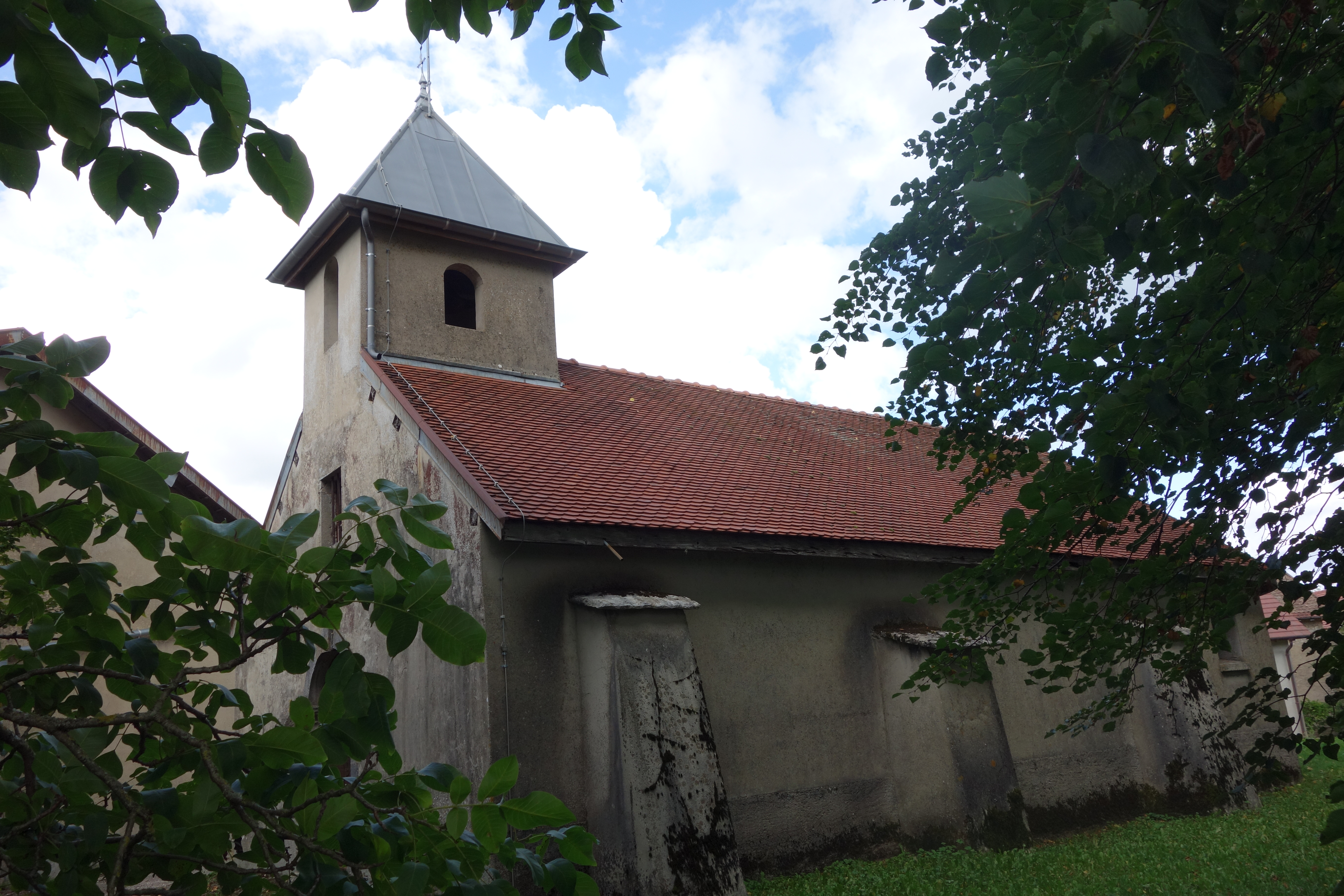 Vertamboz - chapelle - Jura